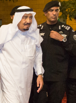 الملك سلمان بن عبد العزيز برفقة حارسه الشخصي اللواء عبد العزيز الفغم.